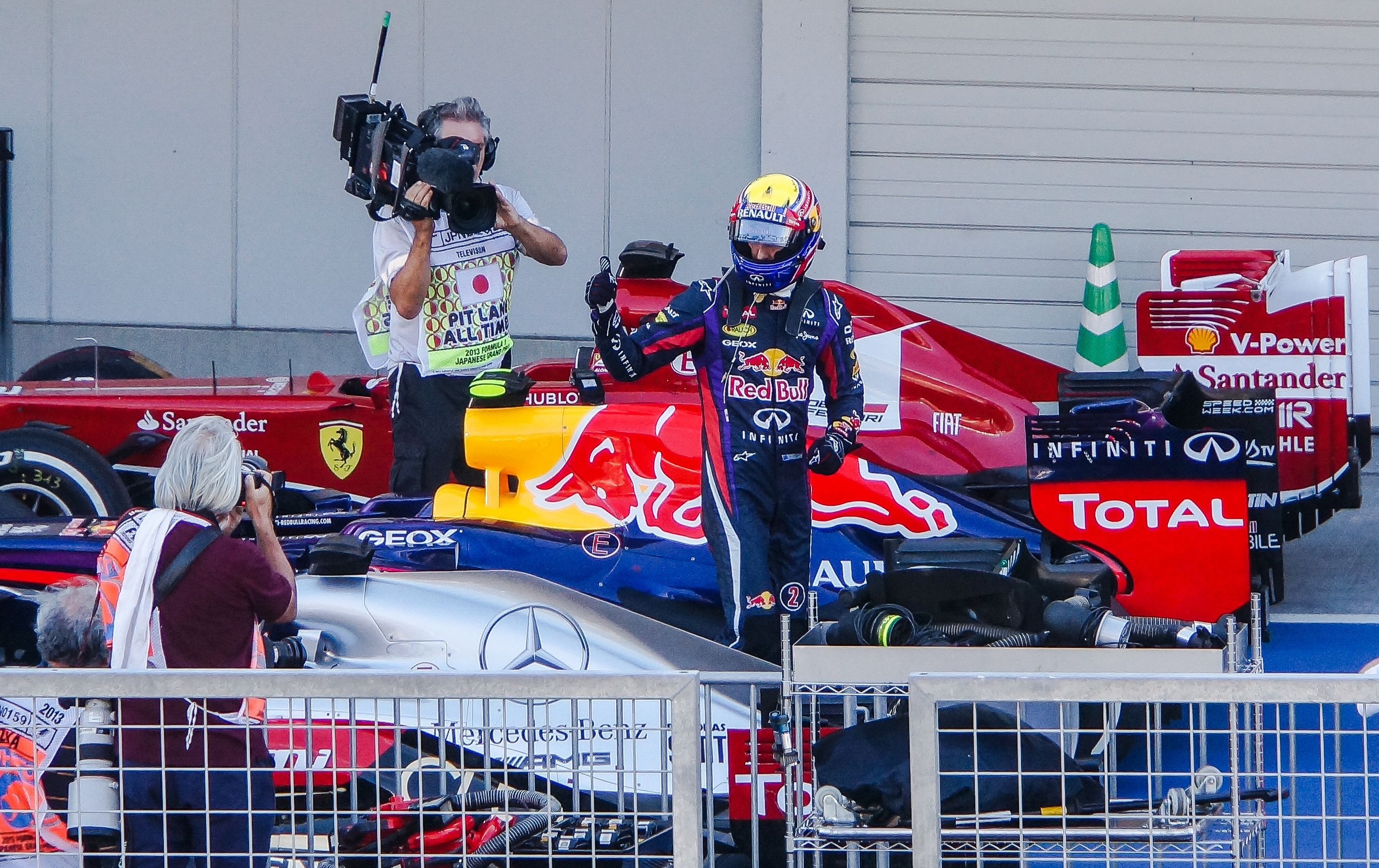 Mark Webber à l'issue de la séance de qualification lors de laquelle il décroche la pole position